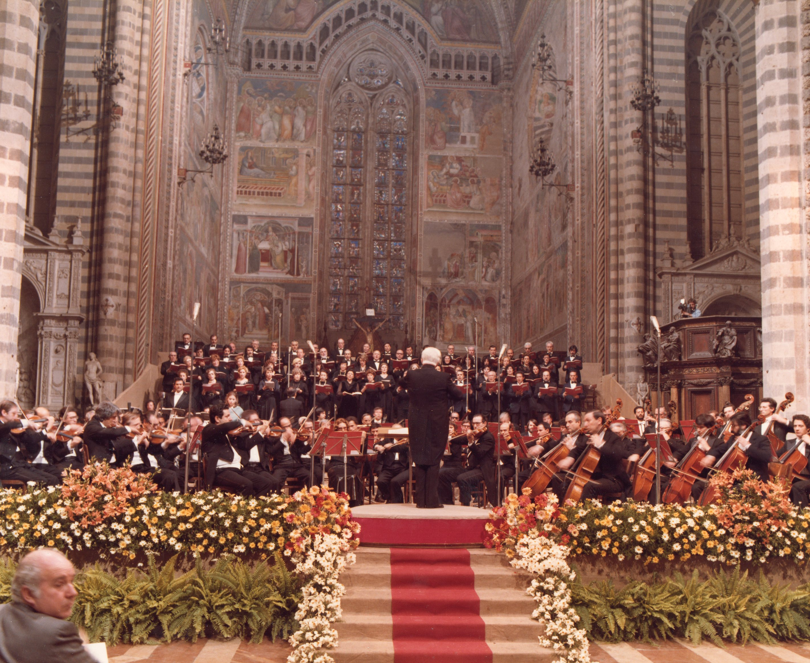 Direttore Gavazzeni Gianandrea, Orvieto. Concerto TV mondovisione.